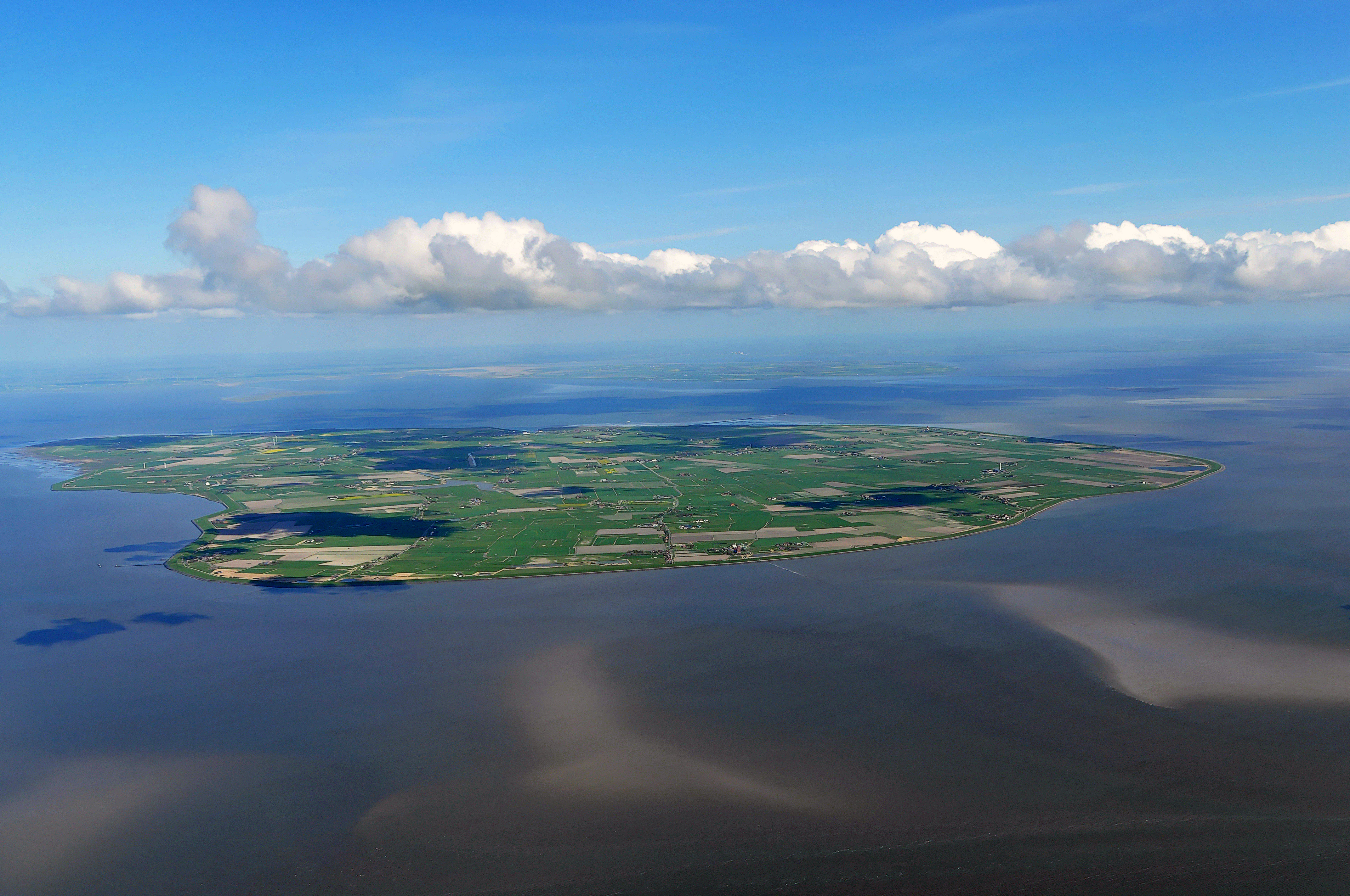 Luftbilder von der Nordseeküste 2012-04: Pellworm